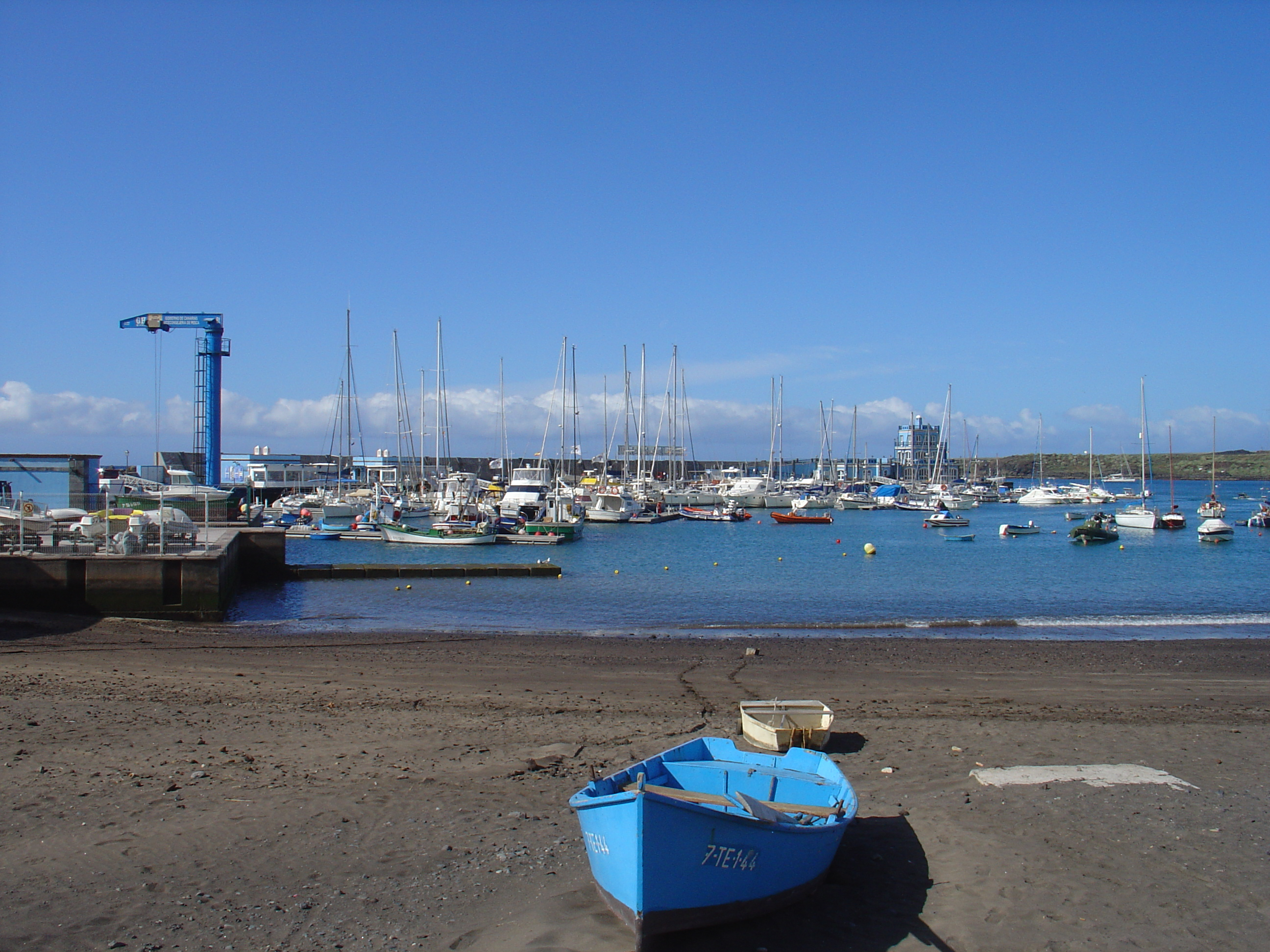 Muelle de Las Galletas y parte de la playa